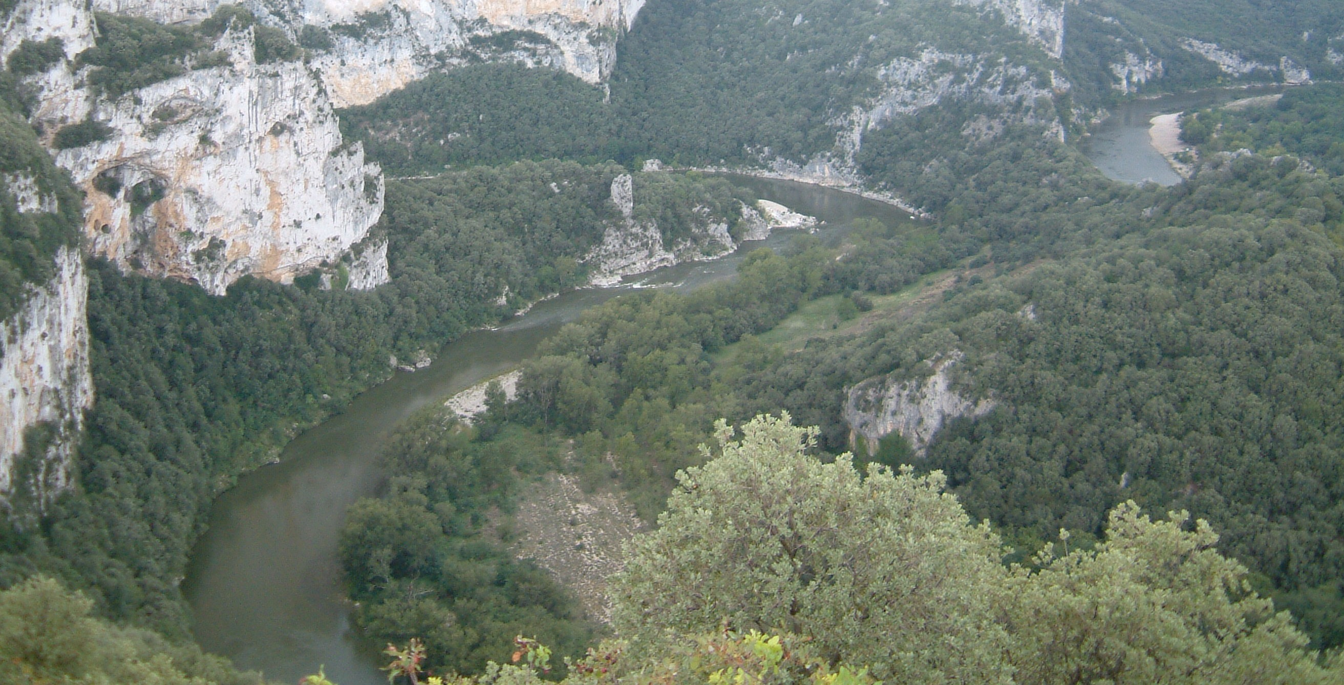 Blick aufs Tal der Ardèche, südlich der Cevennen (Südfrankreich)